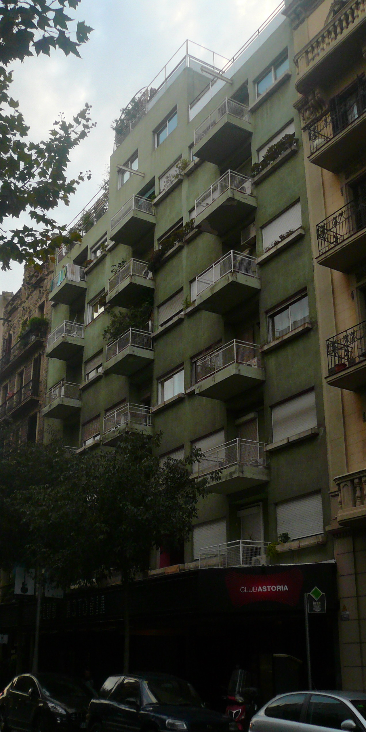 Edifici Astòria (Barcelona)